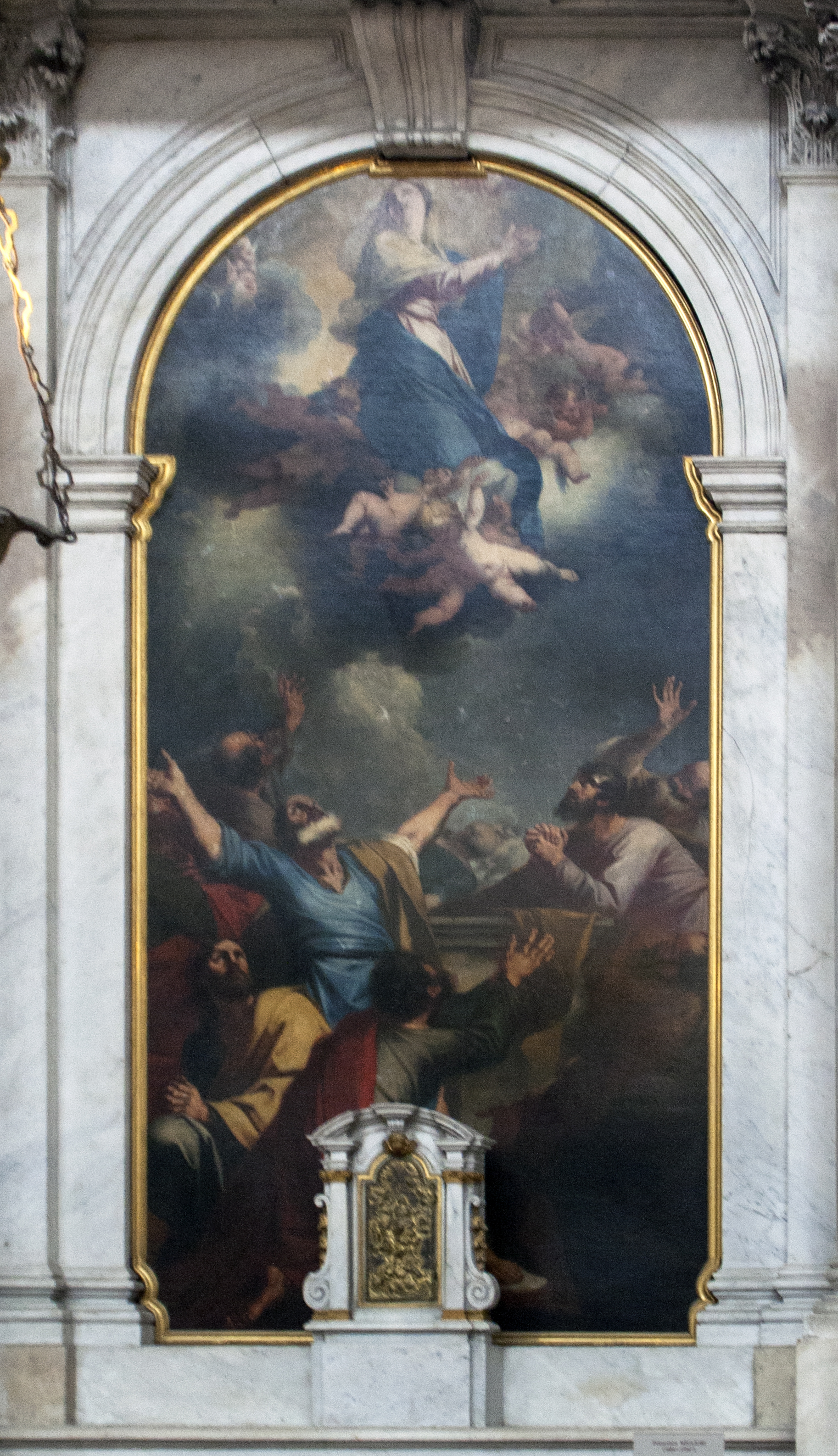 Assunta di Francesco Migliori, chiesa di San Stae, Venezia